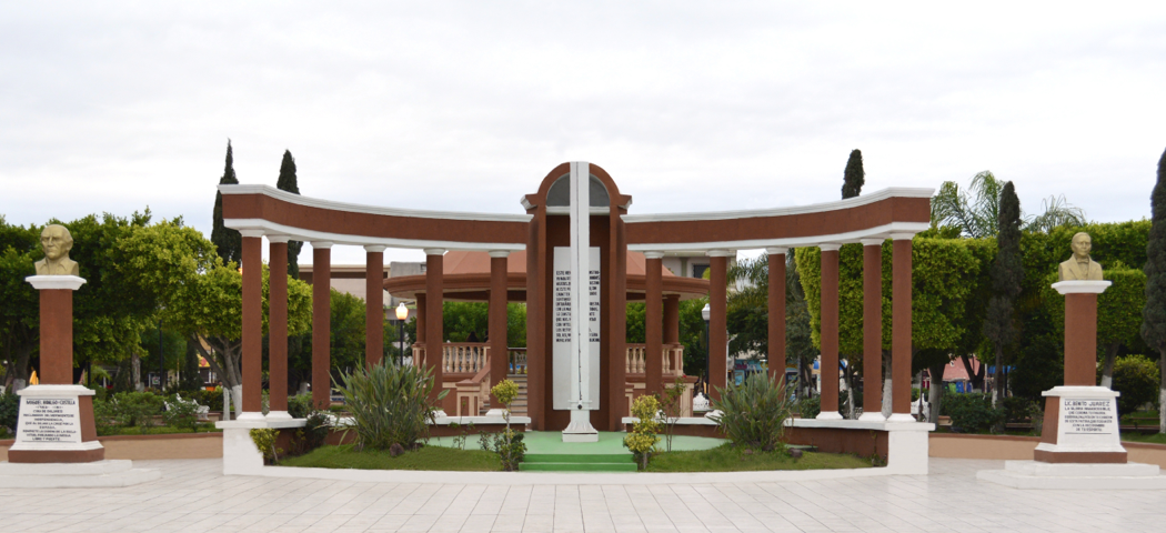 Plaza de Armas de Valle Hermoso, Tamaulipas, México